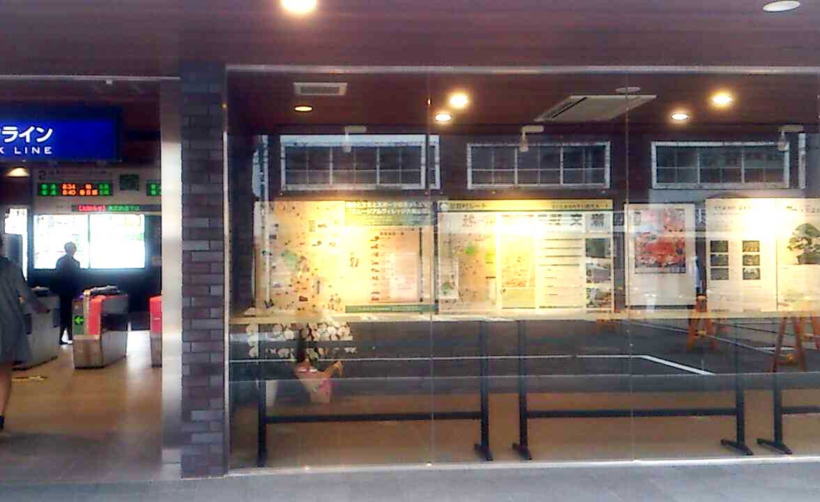 Omiya-Koen-Sta-Galleryspace